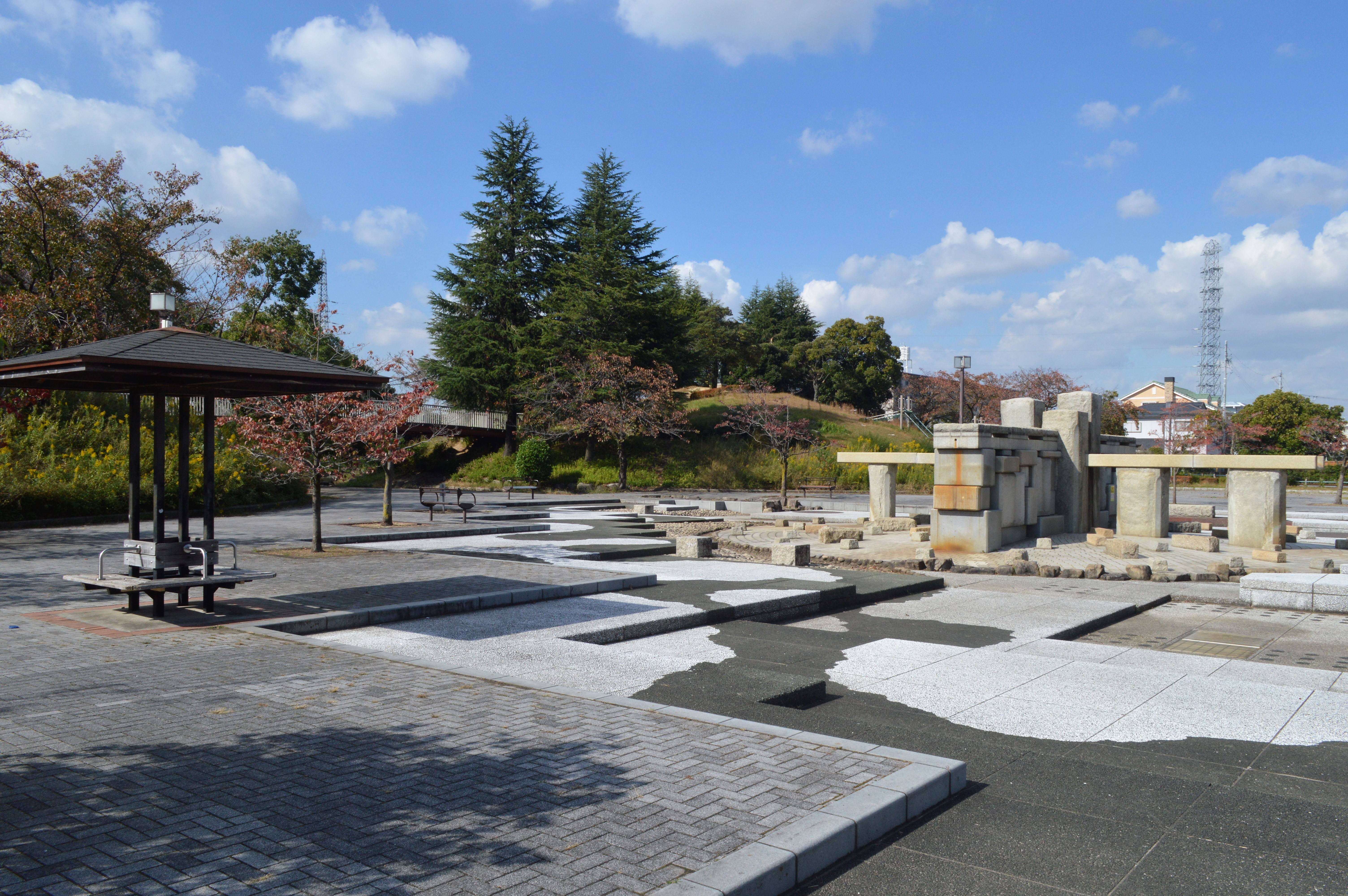 愛知県知立市の新地公園。